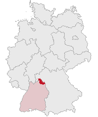 Main-Tauber-Kreis, Baden-Württemberg, Germany